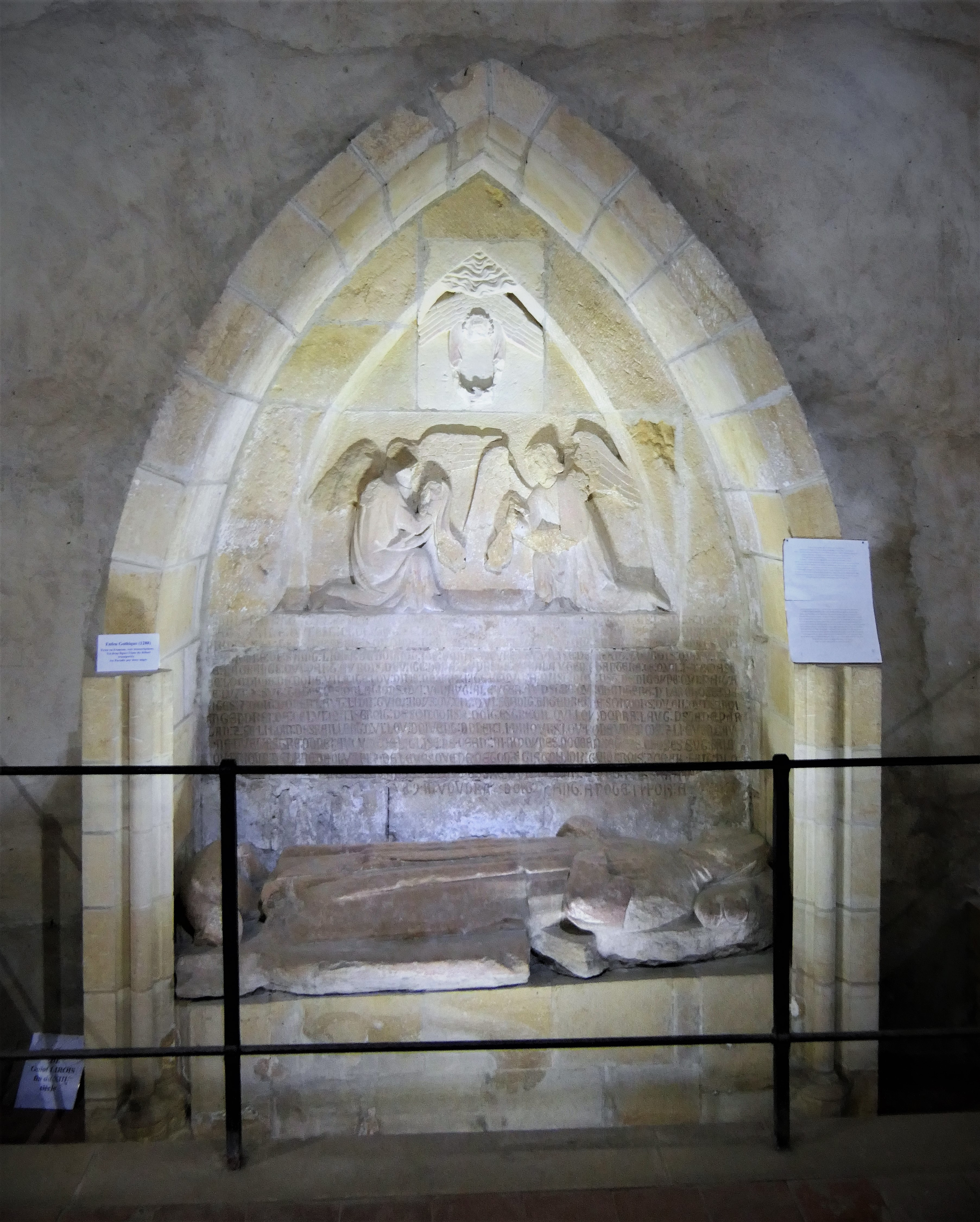 Bourbon Lancy Musée Saint-Nazaire, enfeu (1288)